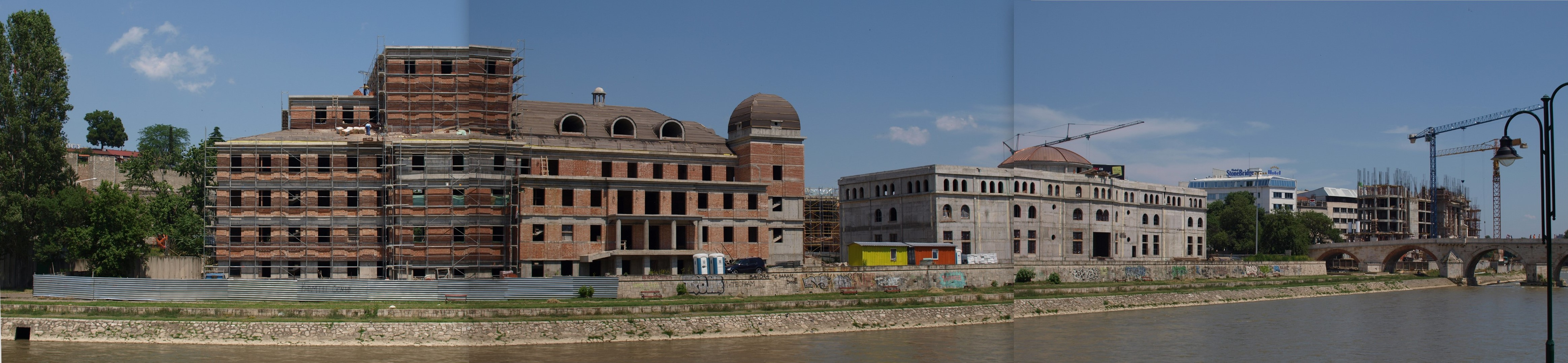 Skopje, Macedonia